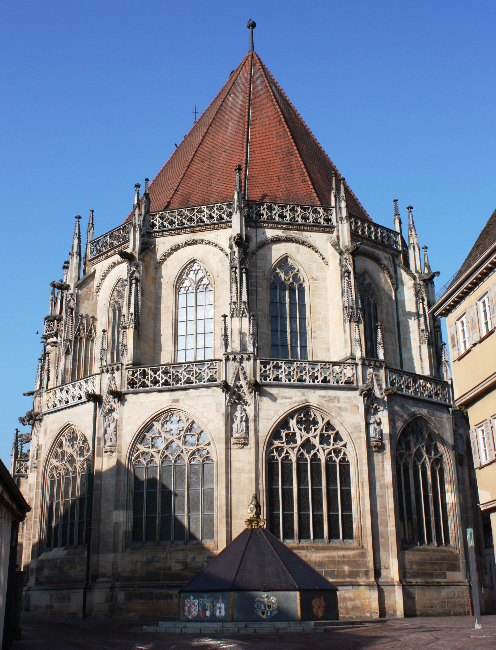 Heilig-Kreuz-Münster Schwäbisch Gmünd von Osten